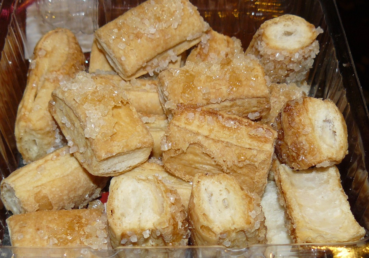 Polskie ciasteczka Belwederki.